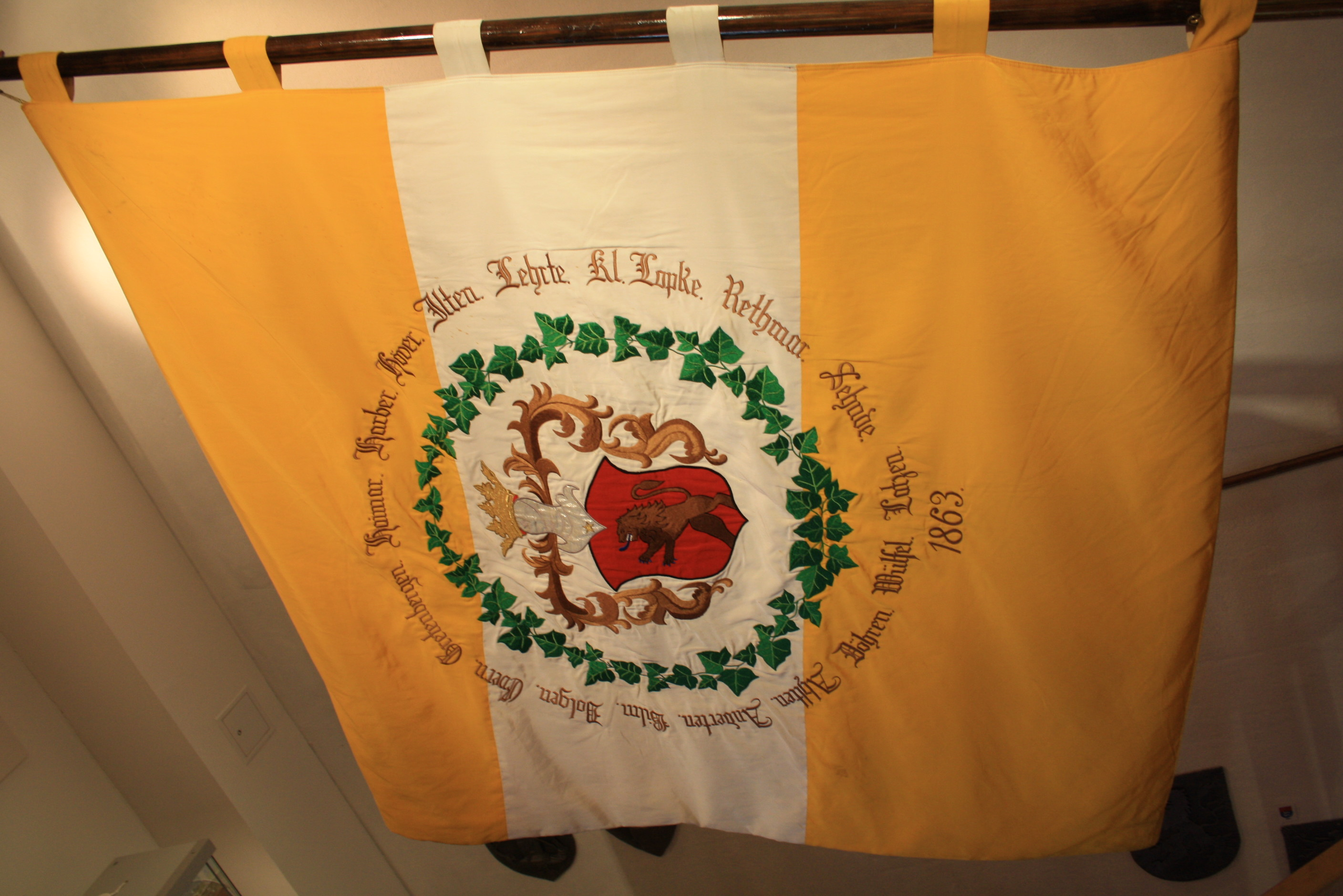 Nachbildung der Fahne des Großen Freien von 1863 im Regionalmuseum Sehnde-Rethmar am 27. Sept. 2009